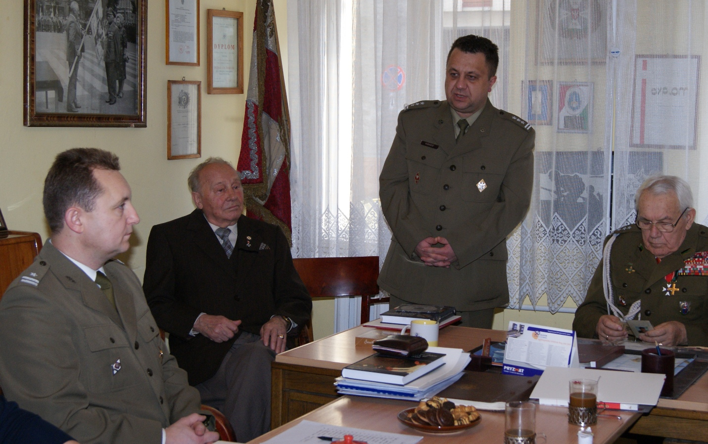 Szczecin, 2009 r. Komendant 109 Szpitala Wojskowego płk mgr Dariusz Ksiądz